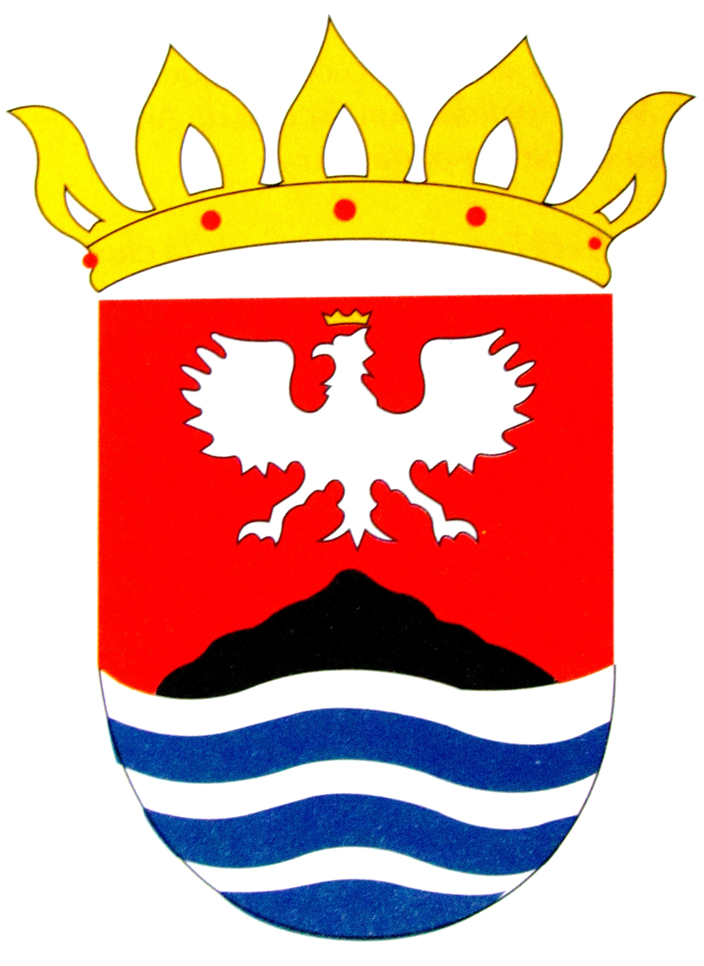 Escudo de Coronel